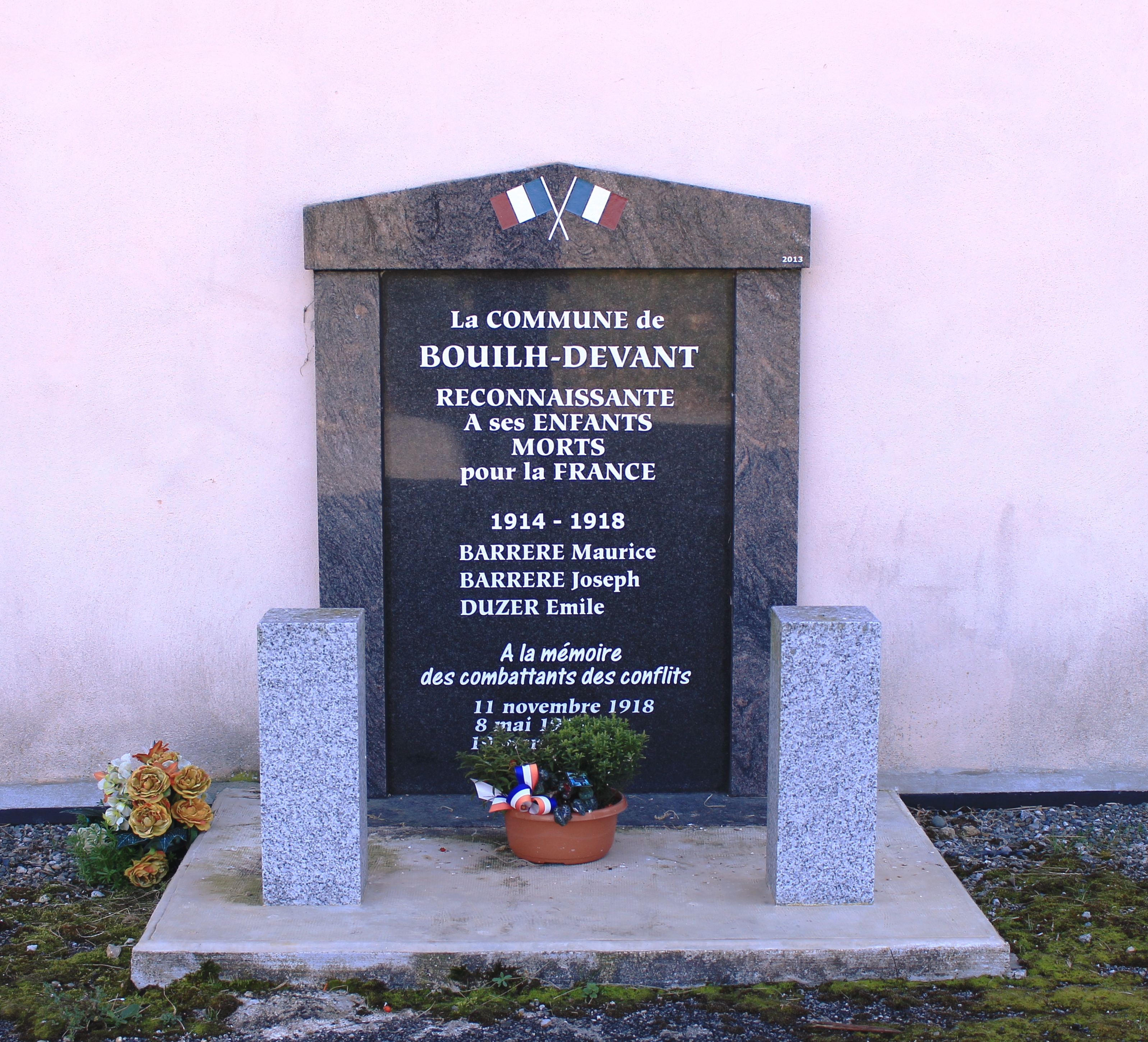 Monument aux morts de Bouilh-Devant (Hautes-Pyrénées)